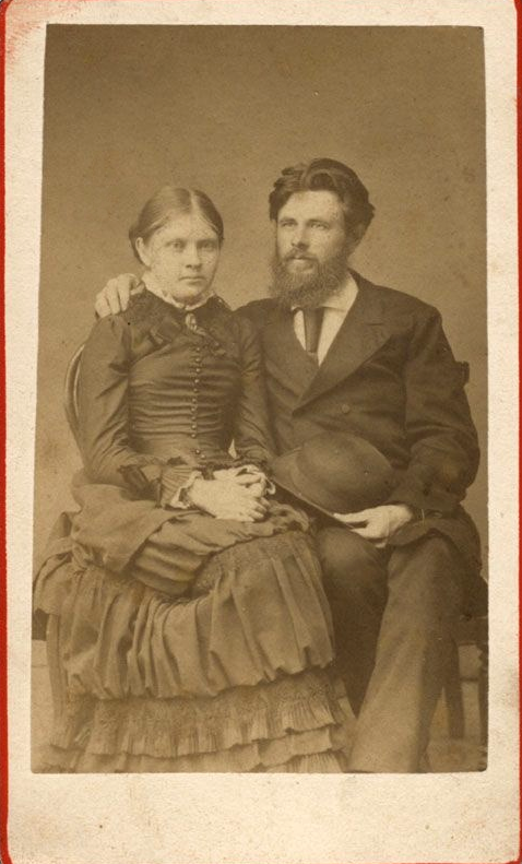 Мяздриков Иван Петрович и жена Александра Александровна. Россия, город Муром. Фото - конец 1880-х гг._e1